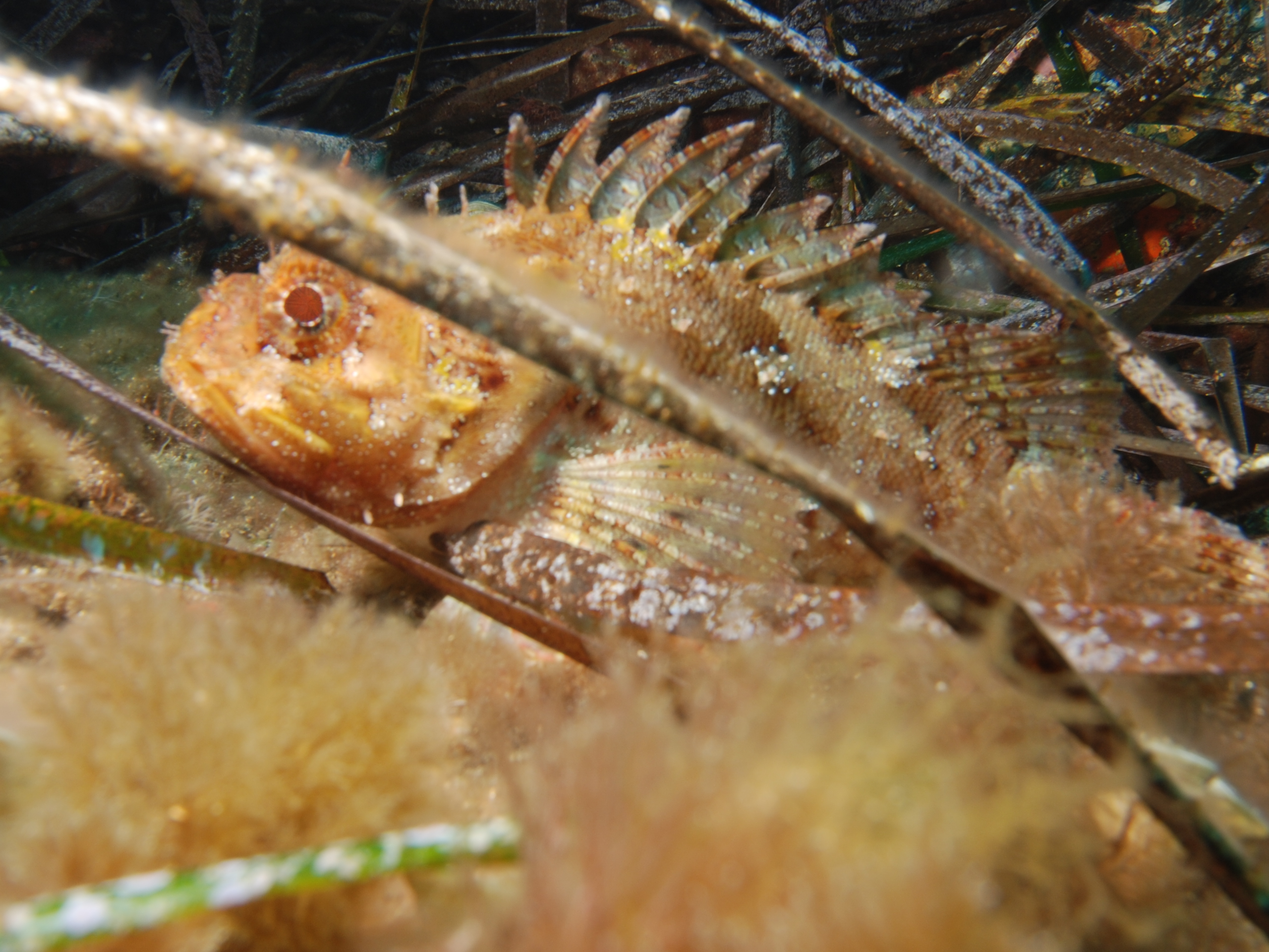 scorpaaena porcus2